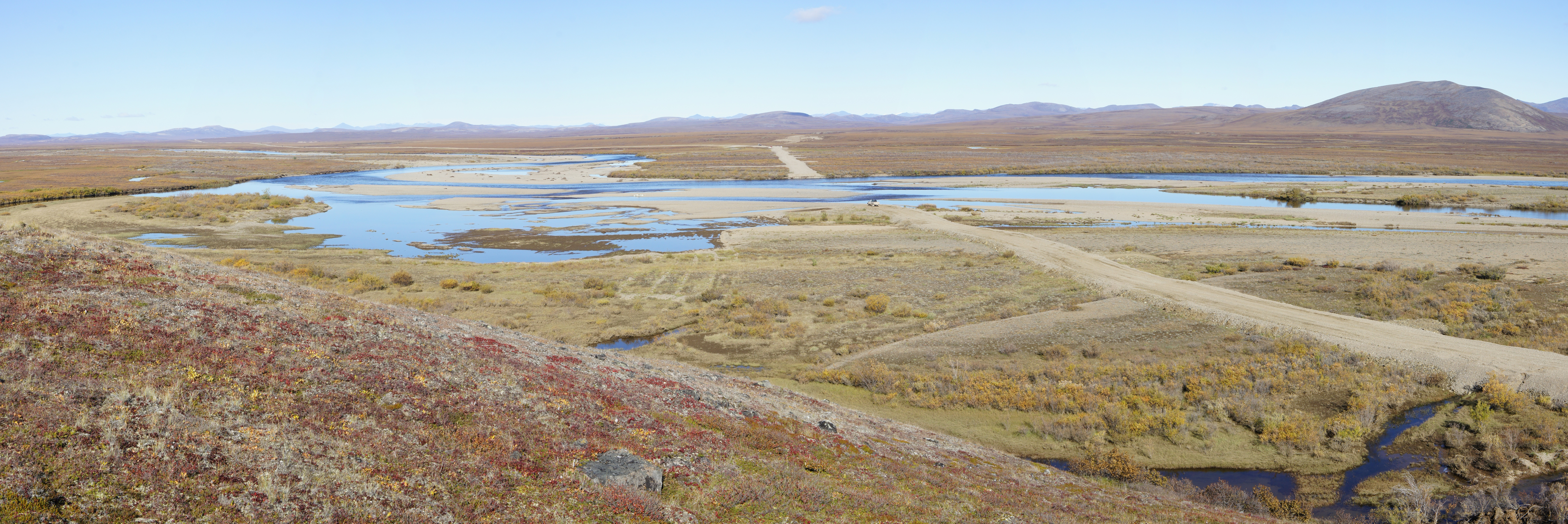 Малый Анюй в месте пересечения дороги Купол-Двойной